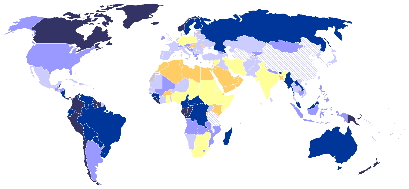 Disponibilité en eau douce mondiale, m³/personne/an début des années 2000 #333366:de 50 000 à 605 000 m3 #003599: de 15 000 à 50 000 m3 #9999ff: de 5000 à 15000 m3 #ccccff de 2500 à 5000 m3 hachures #ccccff & #fff: de 1700 à 2500 m3 vulnérabilité #ffff99: de 1000 à 1700 m3 stress hydrique #ffcc66: de 0 à 1000 m3 état de pénurie